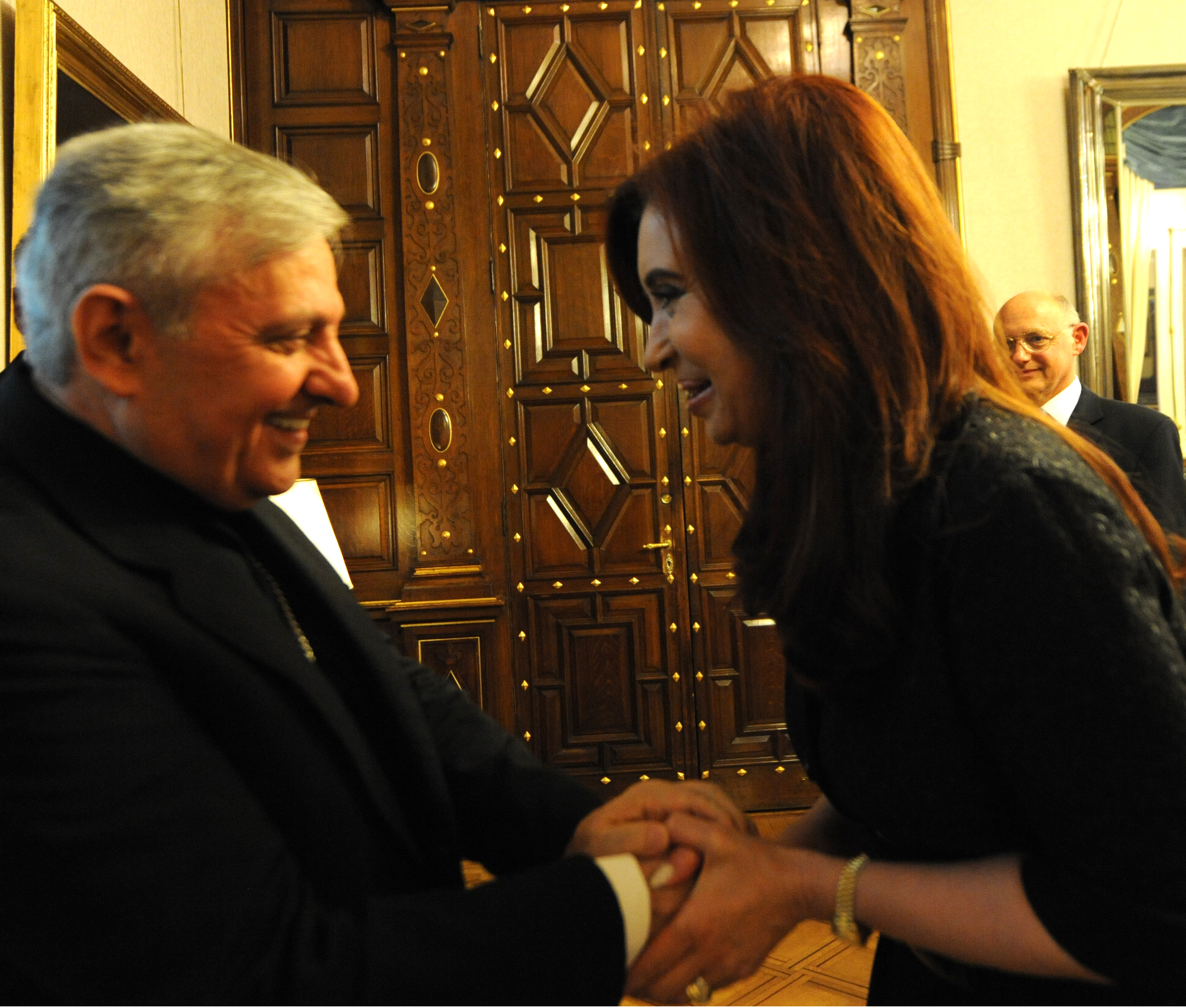 La presidenta Cristina Fernández recibe en su despacho de la Casa de Gobierno, al nuncio apostólico, Adriano Bernardini. Detrás, el canciller Héctor Timerman.